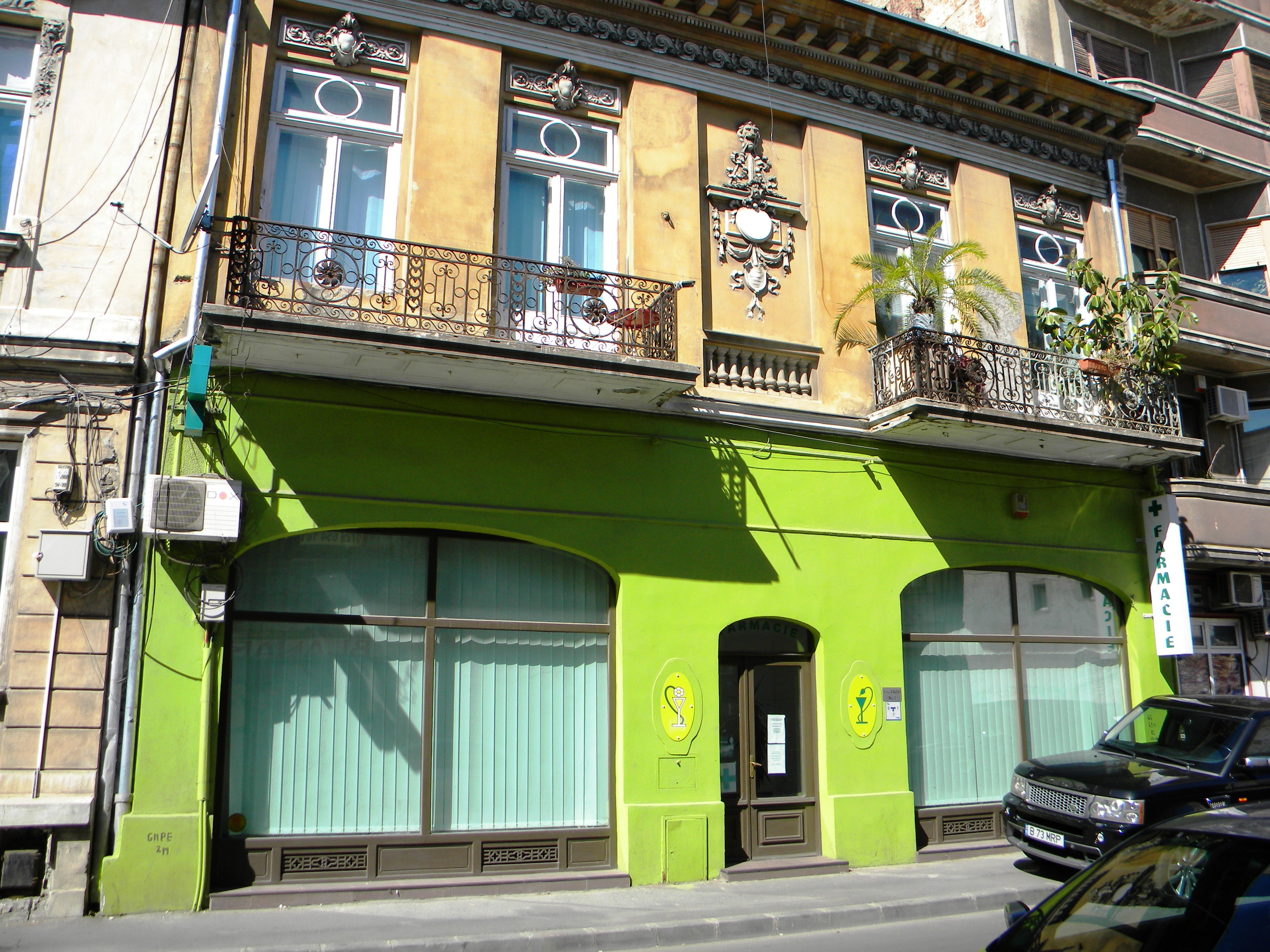 Bucuresti, Romania, Casa pe Str. coltei nr. 7, sect. 3